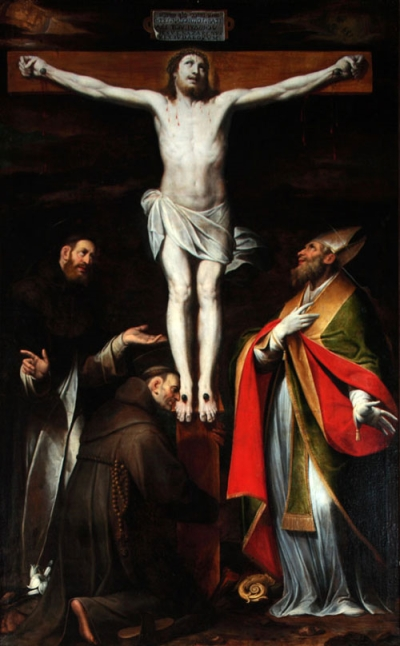 Gesù crocefisso. Pala d'altare.